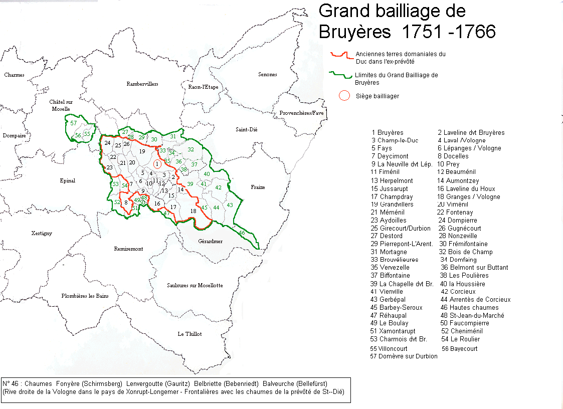 Ancien bailliage de Bruyères dans la Lorraine ducale jusqu'au XVIIIème siècle.